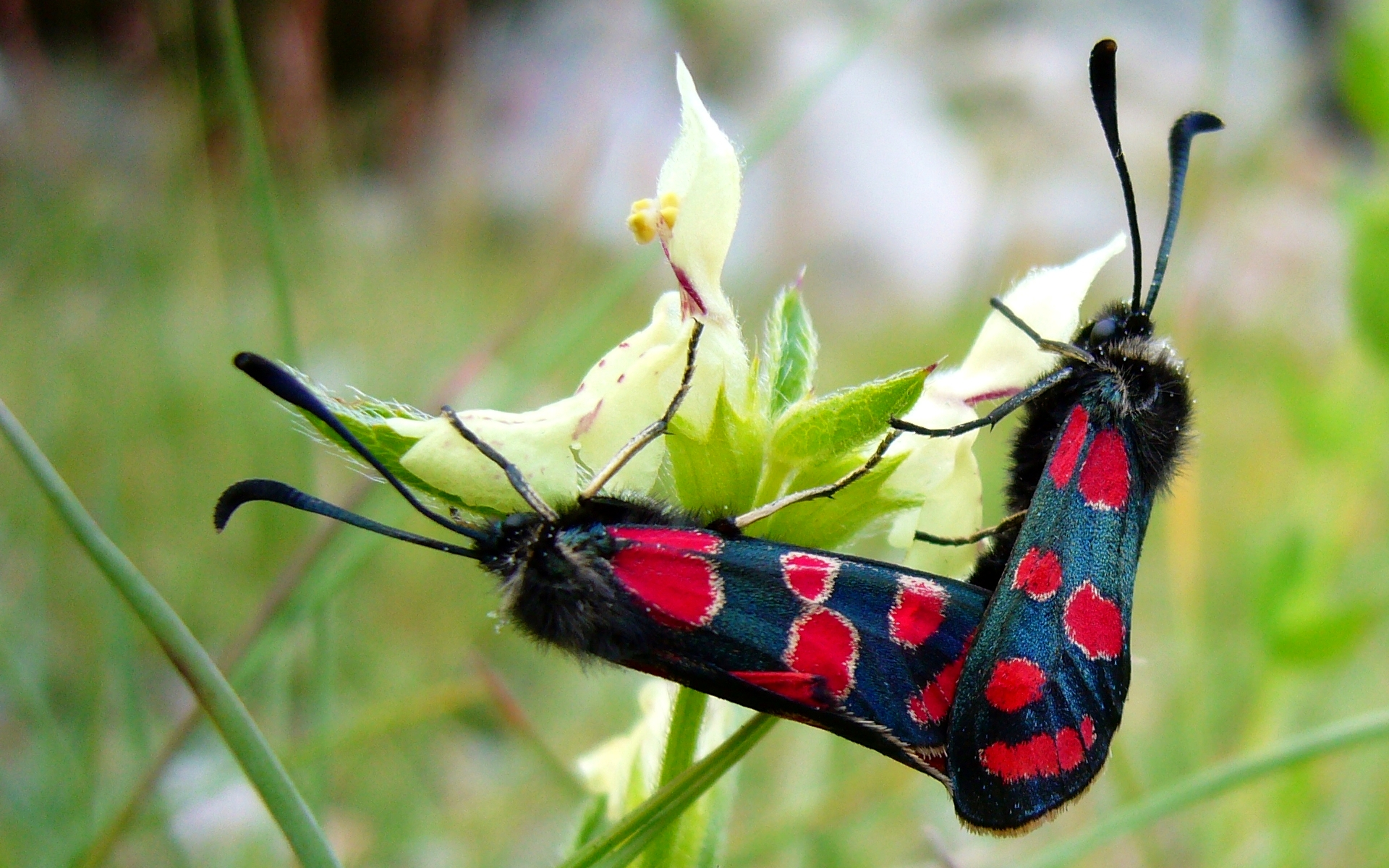 Bonneval-sur-Arc